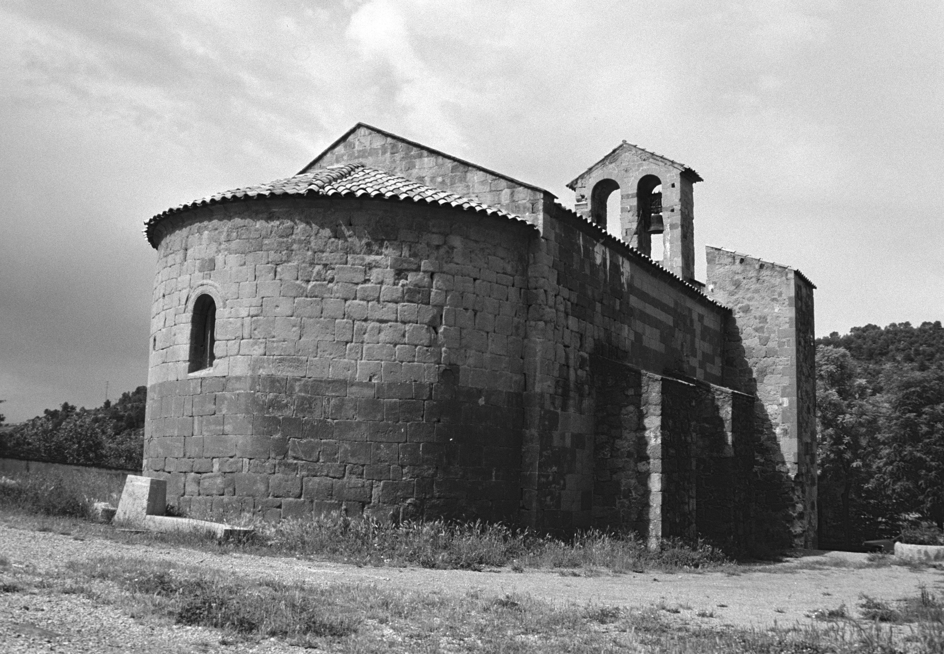 Puig-reig (Berguedà). Antiga església parroquial de Sant Martí, que fou patronatge dels templers. Any 1990.